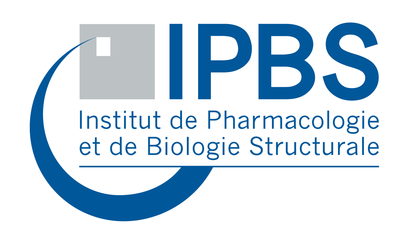 Logo de l'Institut de pharmacologie et de biologie structurale